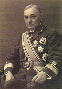 sanitaar-kindralmajor Hans Leesment